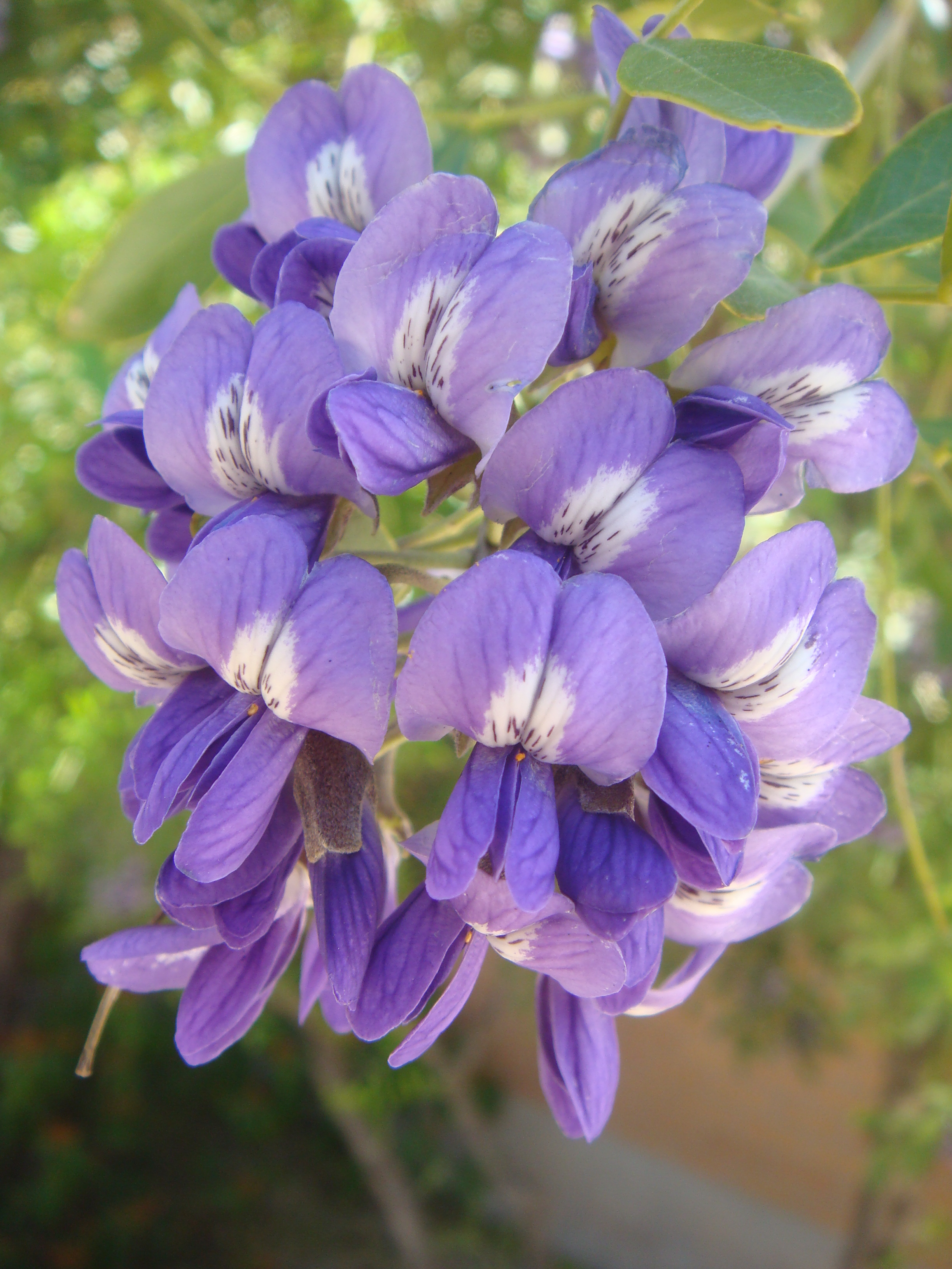 Calia secundiflora, cultivated, Arizona State University, Tempe, Arizona